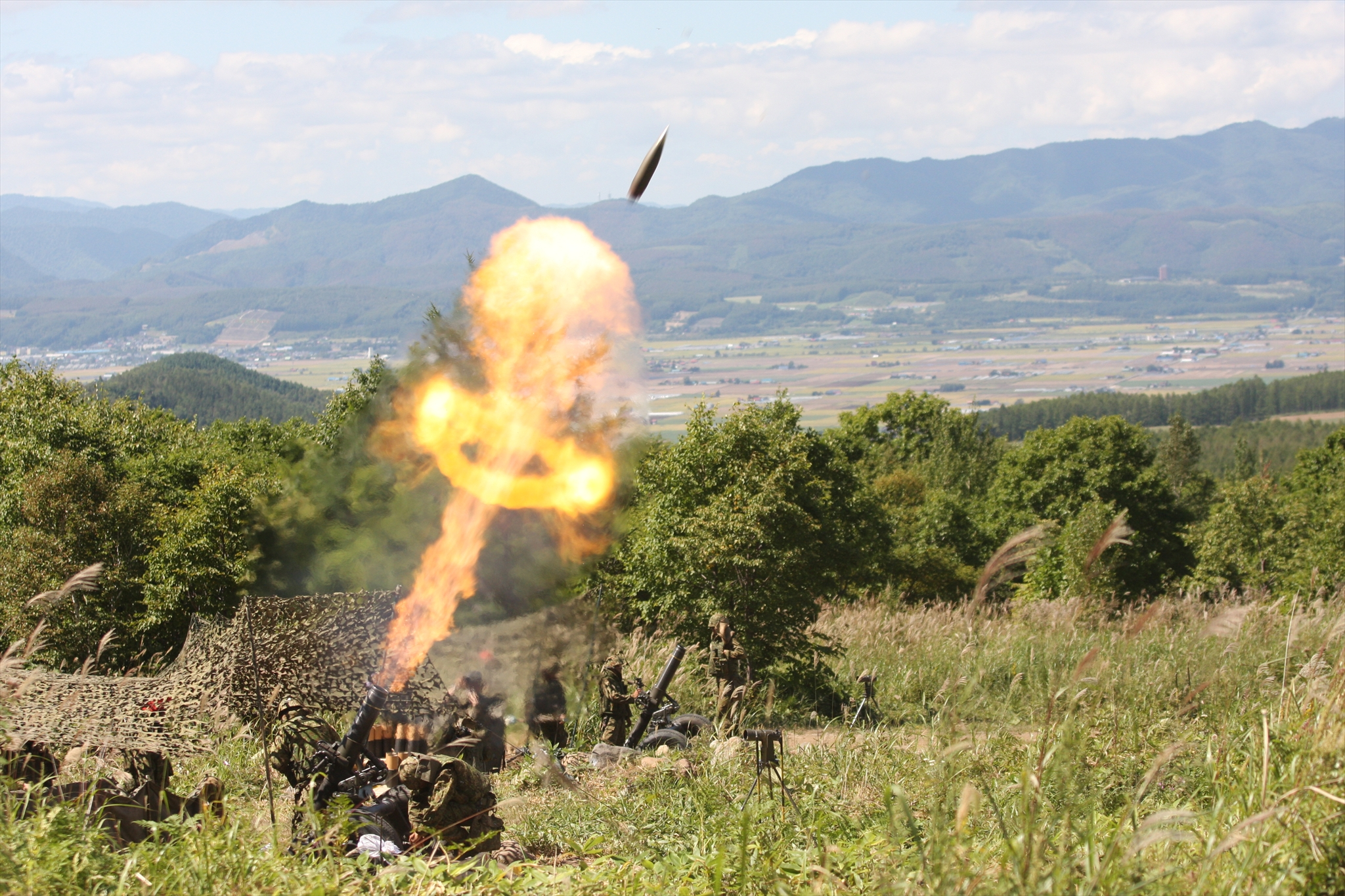 Title １２０ｍｍ迫撃砲ＲＴ (方面隊総合戦闘力演習)_R.JPG Album 装備 １２０ｍｍ迫撃砲ＲＴ （北部方面隊総合戦闘力演習・第２師団）